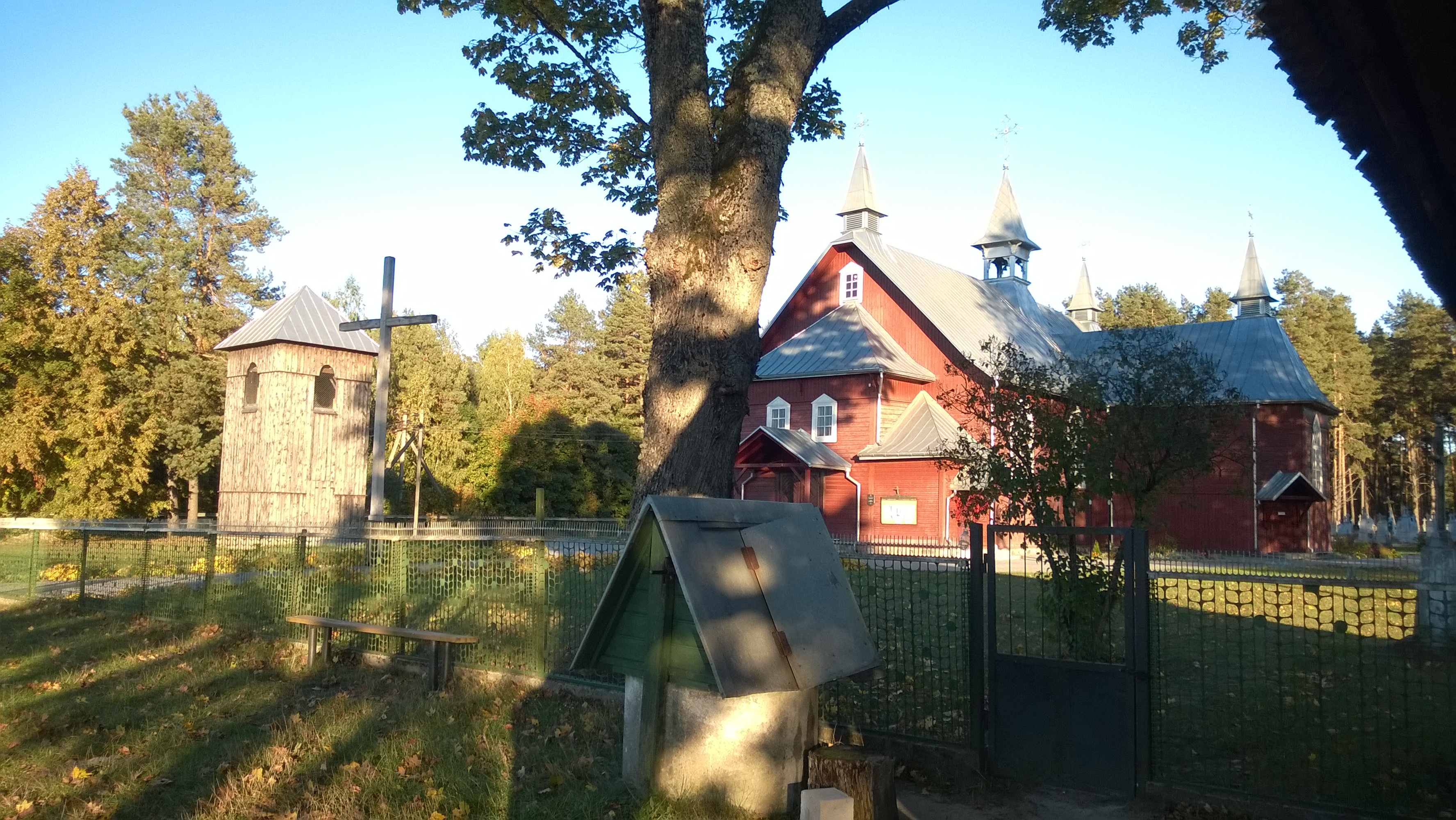 Поречье, Беларусь